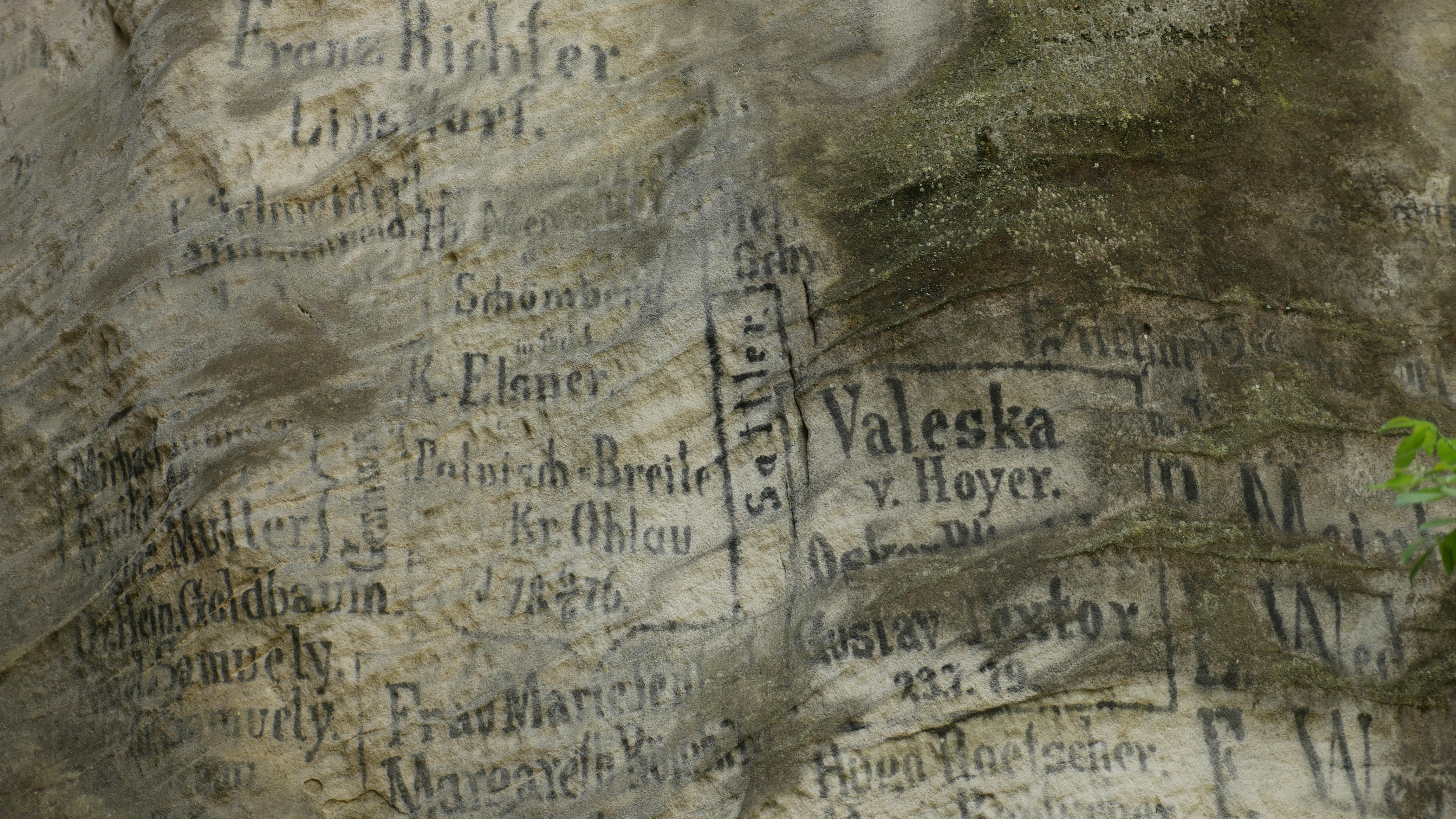 Zabytkowe inskrypcje wykonane przez dawnych turystów na terenie Adršpašsko-Teplickich skał.